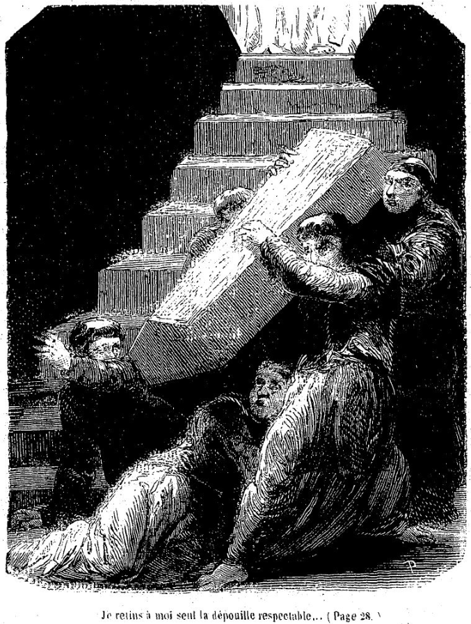 Illustrations de Tony Johannot et Maurice Sand pour le roman "Spiridion" de George Sand, dans sa réédition incluse dans les "Œuvres illustrées de George Sand" parues à Paris chez Hetzel, volume 9, 1856. Illustration figurant en page 33. (Attention : dans les volumes des "Œuvres illustrées de George Sand", la pagination recommence à 1 au début de chaque texte inclus dans un volume.)